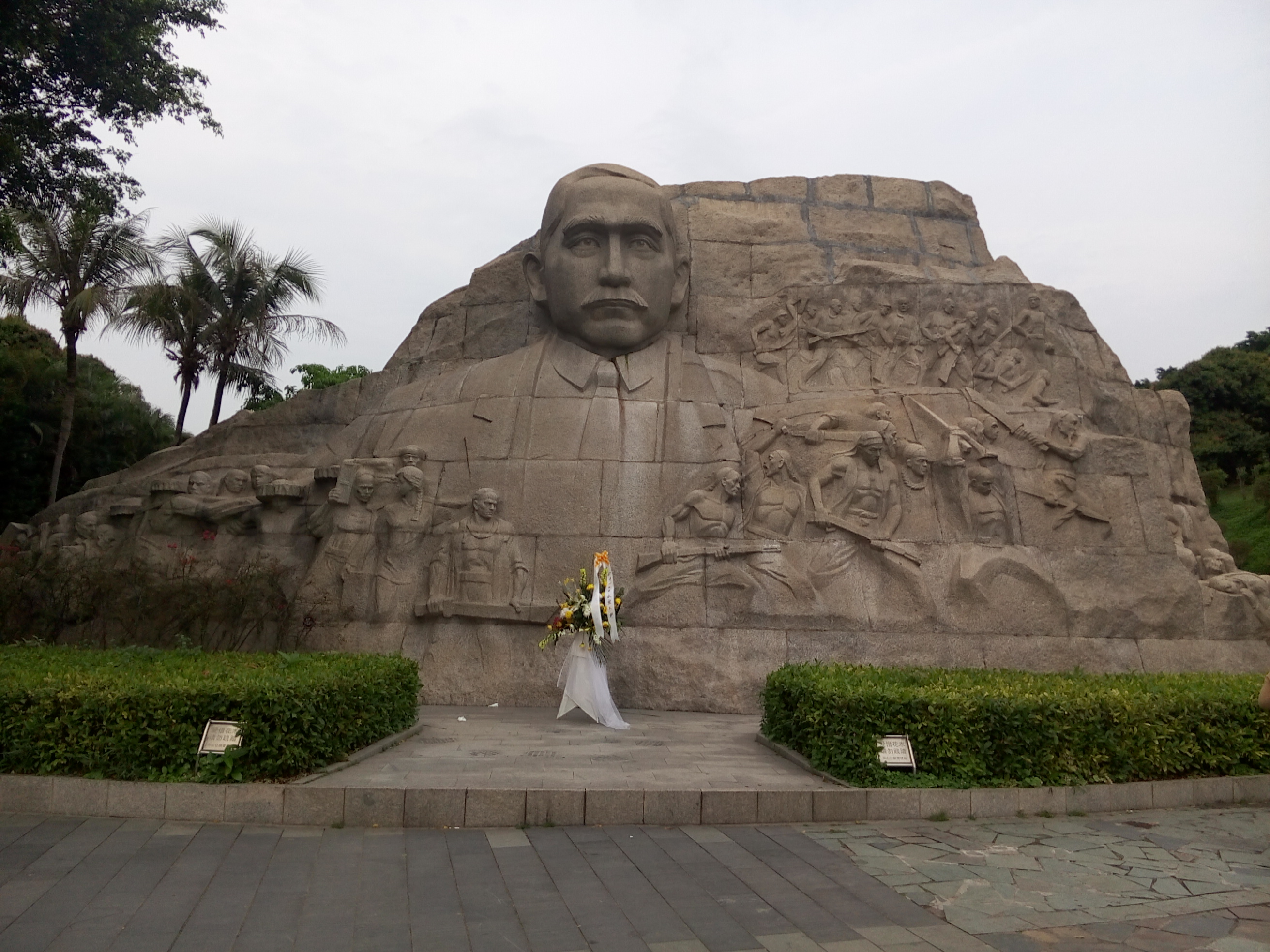 Nanshan Shenzhen